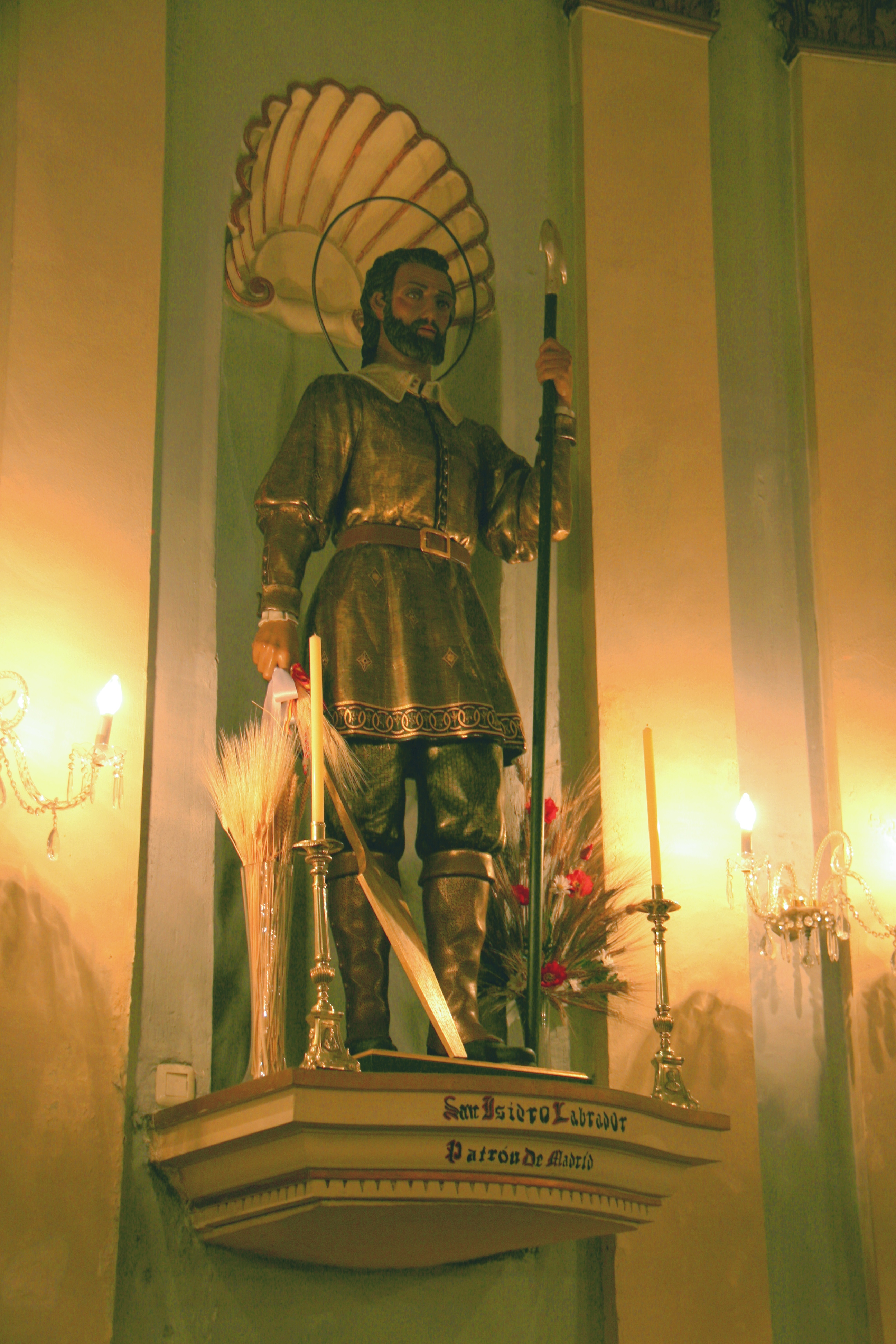 San Isidro Labrador (Colegiata de San Isidro)